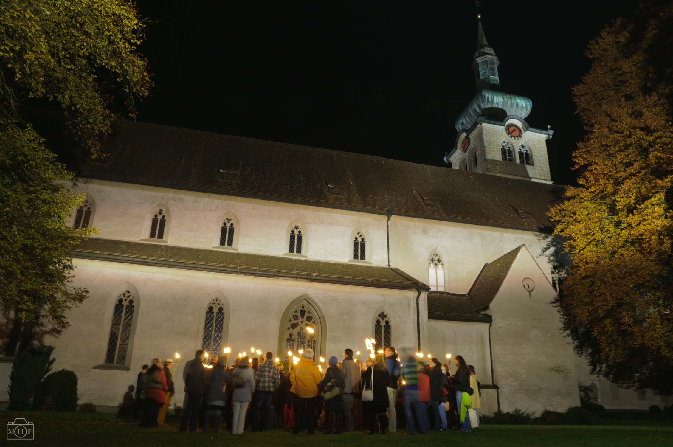 Bischofszell Katholische Kirche St. Pelagius bei Nacht